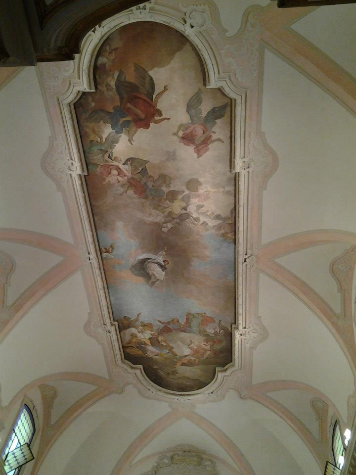 "Assunzione" del Canal nel soffitto della Chiesa Arcipretale di Scorzè